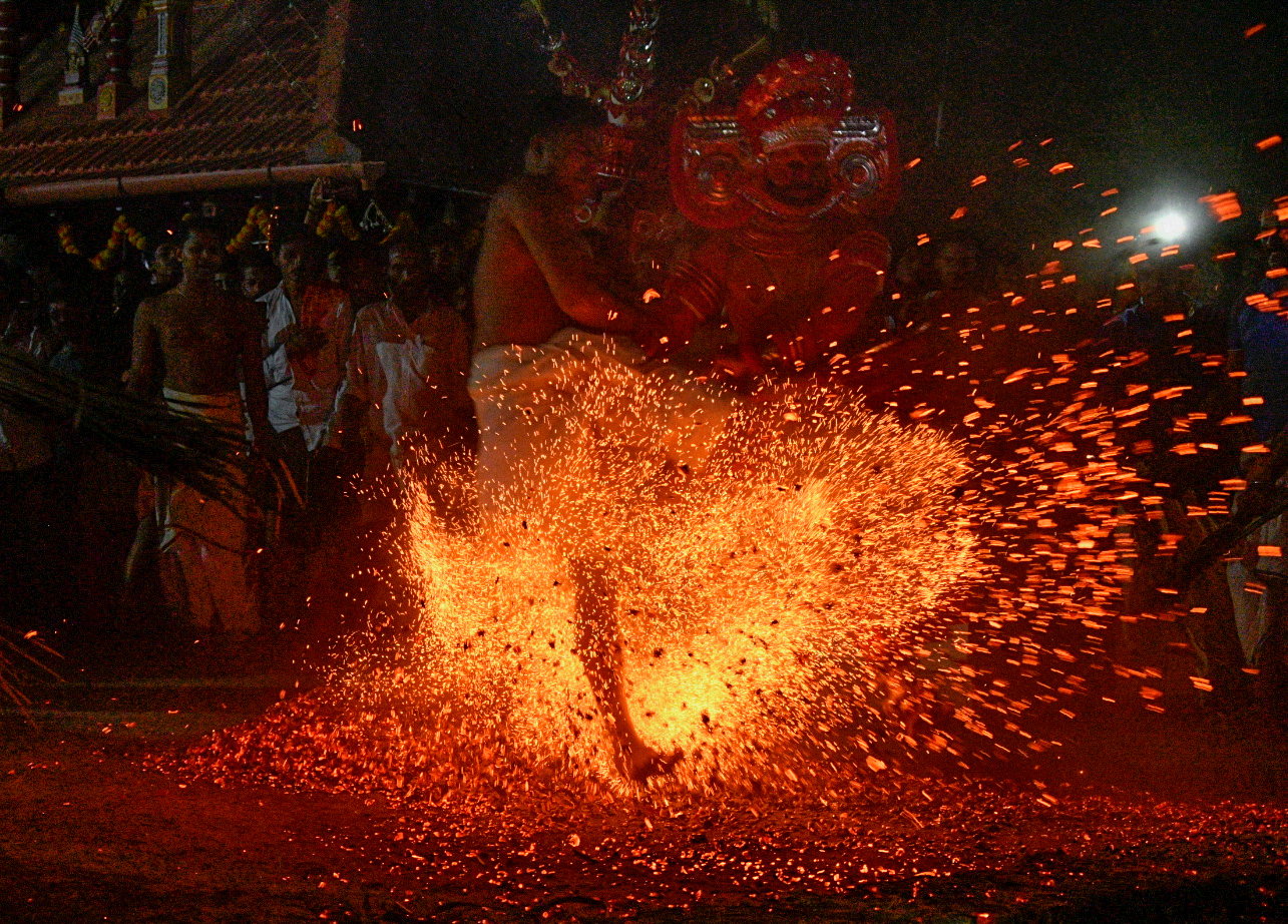 Theyyam at Muzhappilangad Porkkali kaavu